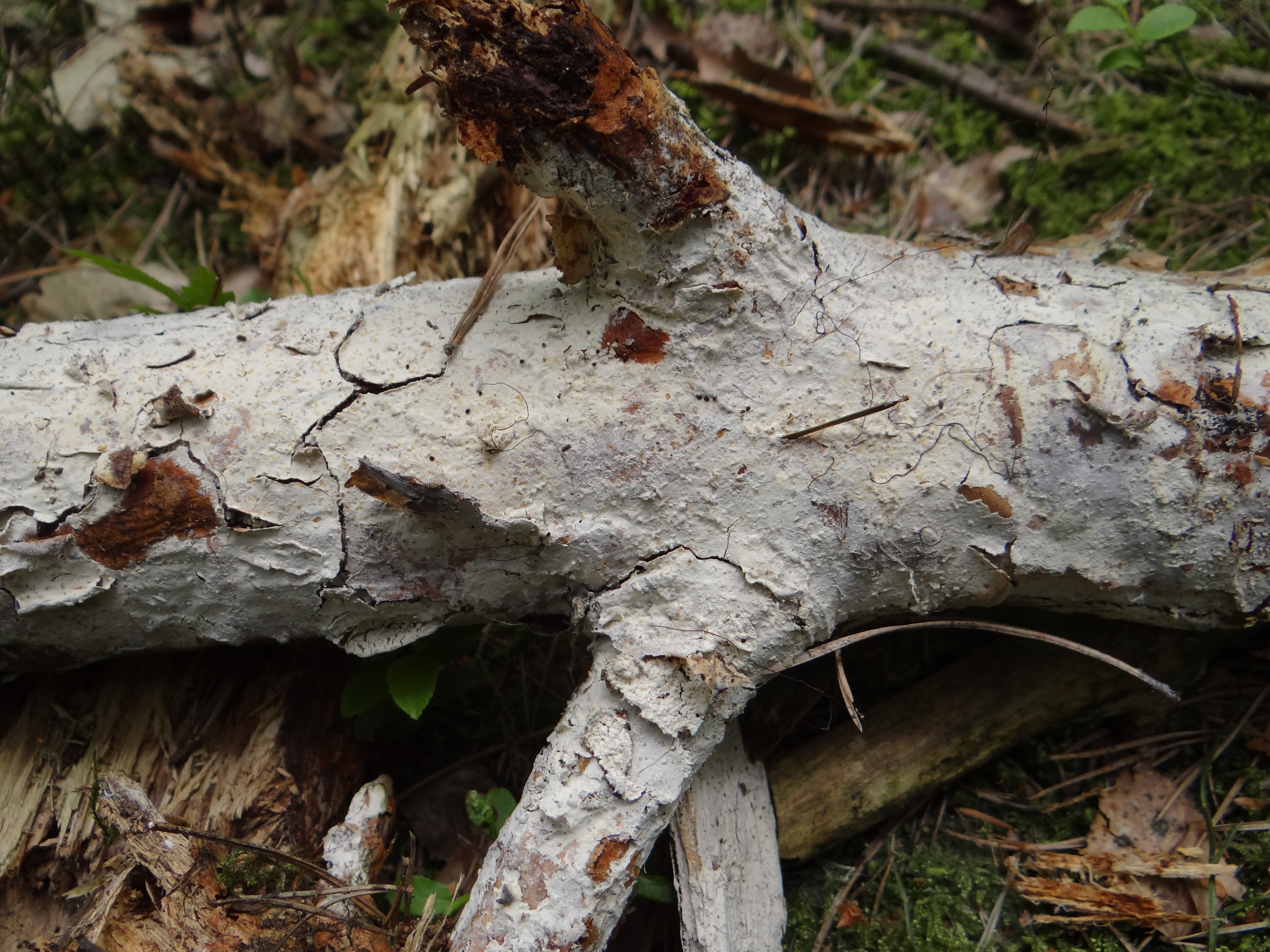 Phanerochaete sordida on tree bark. Location: Poland, Kamionna (województwo małopolskie)